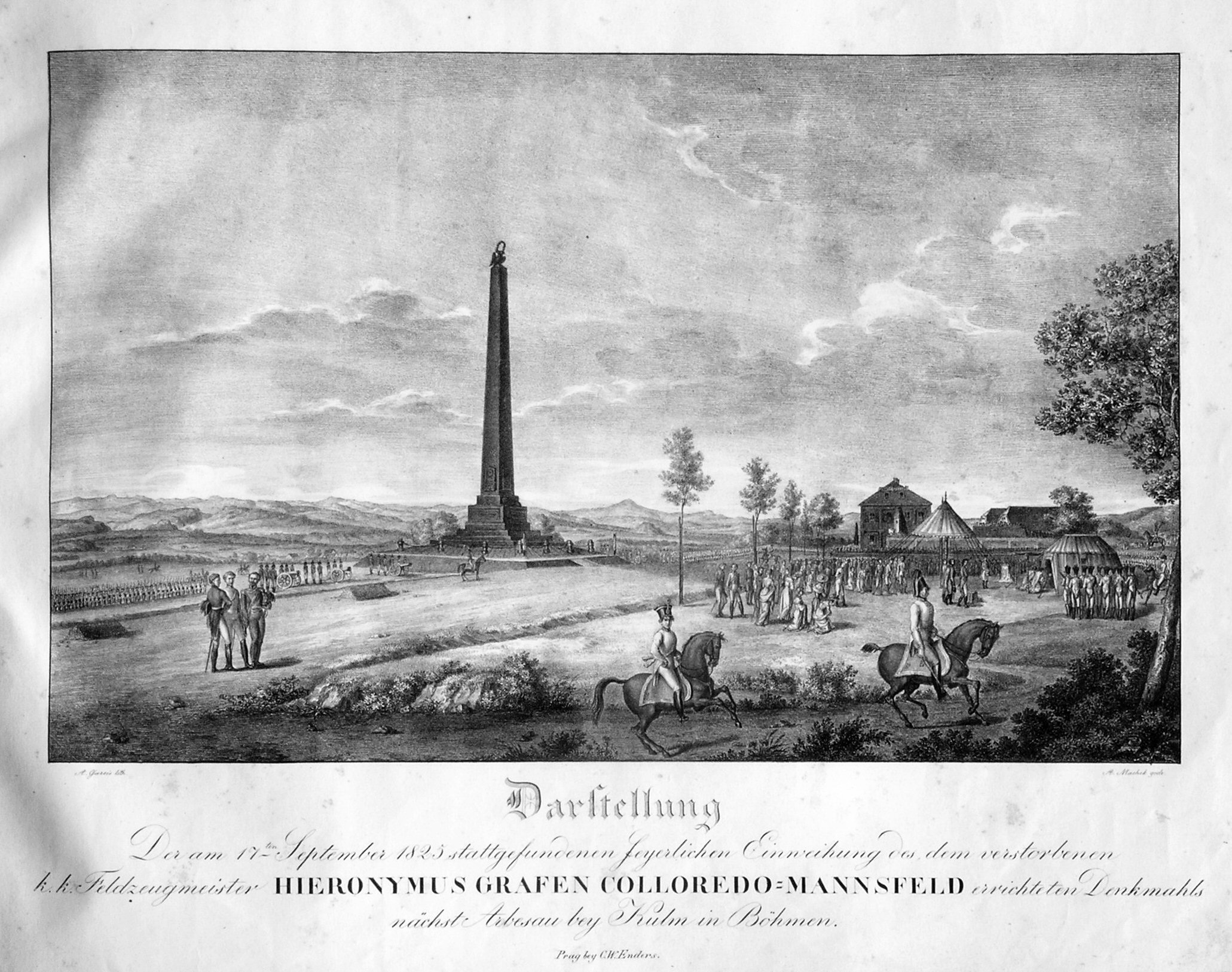 Errichtung des Denkmals für Feldzeugmeister Hieronymus von Colloredo-Mansfeld bei Kulm (Böhmen), zeitgenössische Lithographie ca. 1825